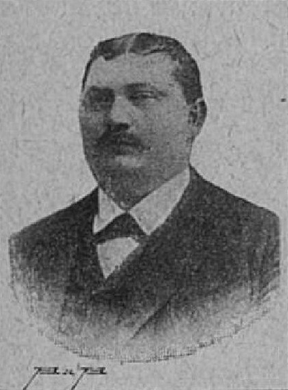 Josef Kudrnka (1860-?), rakouský a český rolník a politik